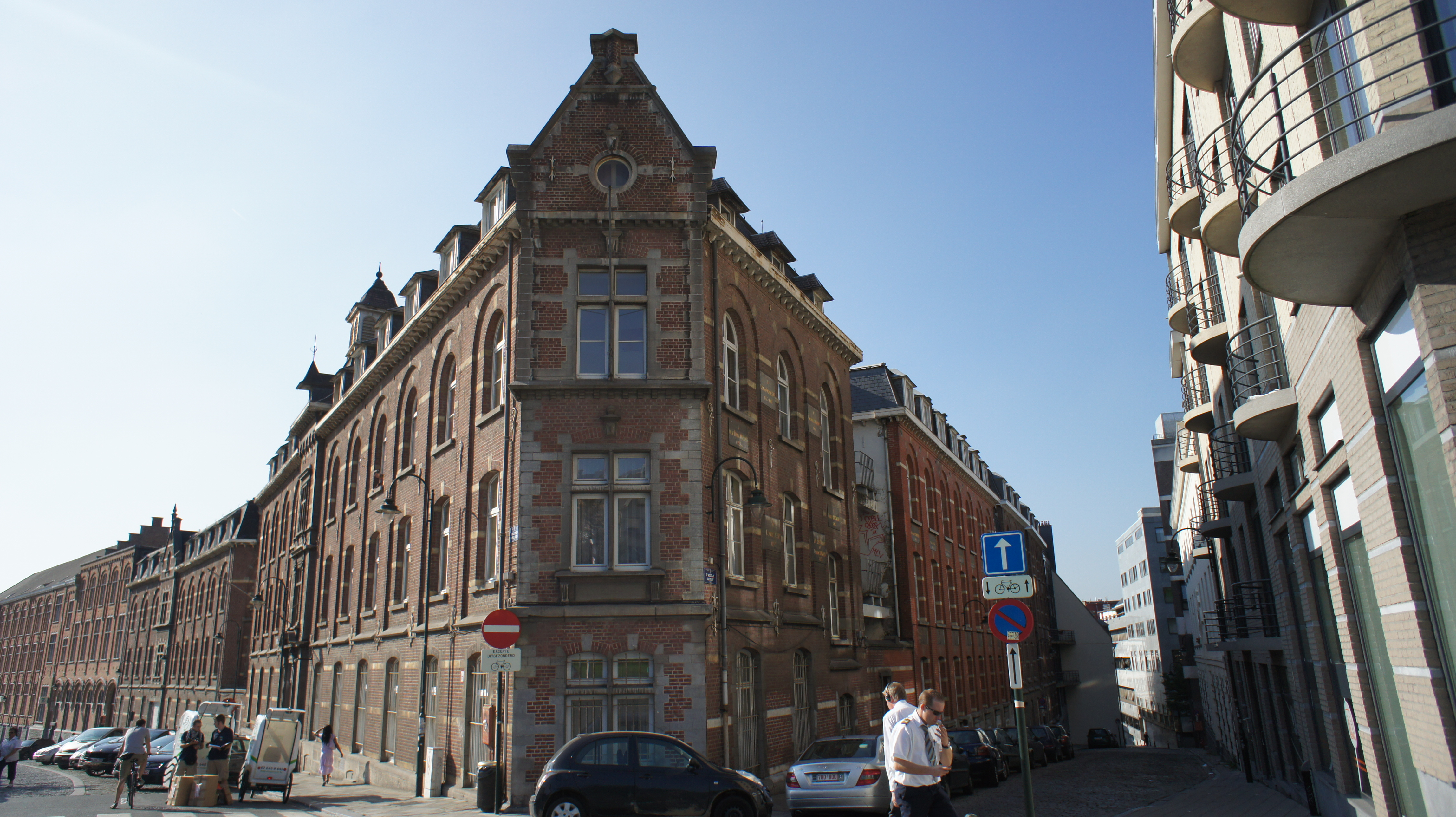 Maison de repos "Aux Ursulines", au coin de la Rue des Ursulines et de la Rue d'Accolay, Bruxelles.